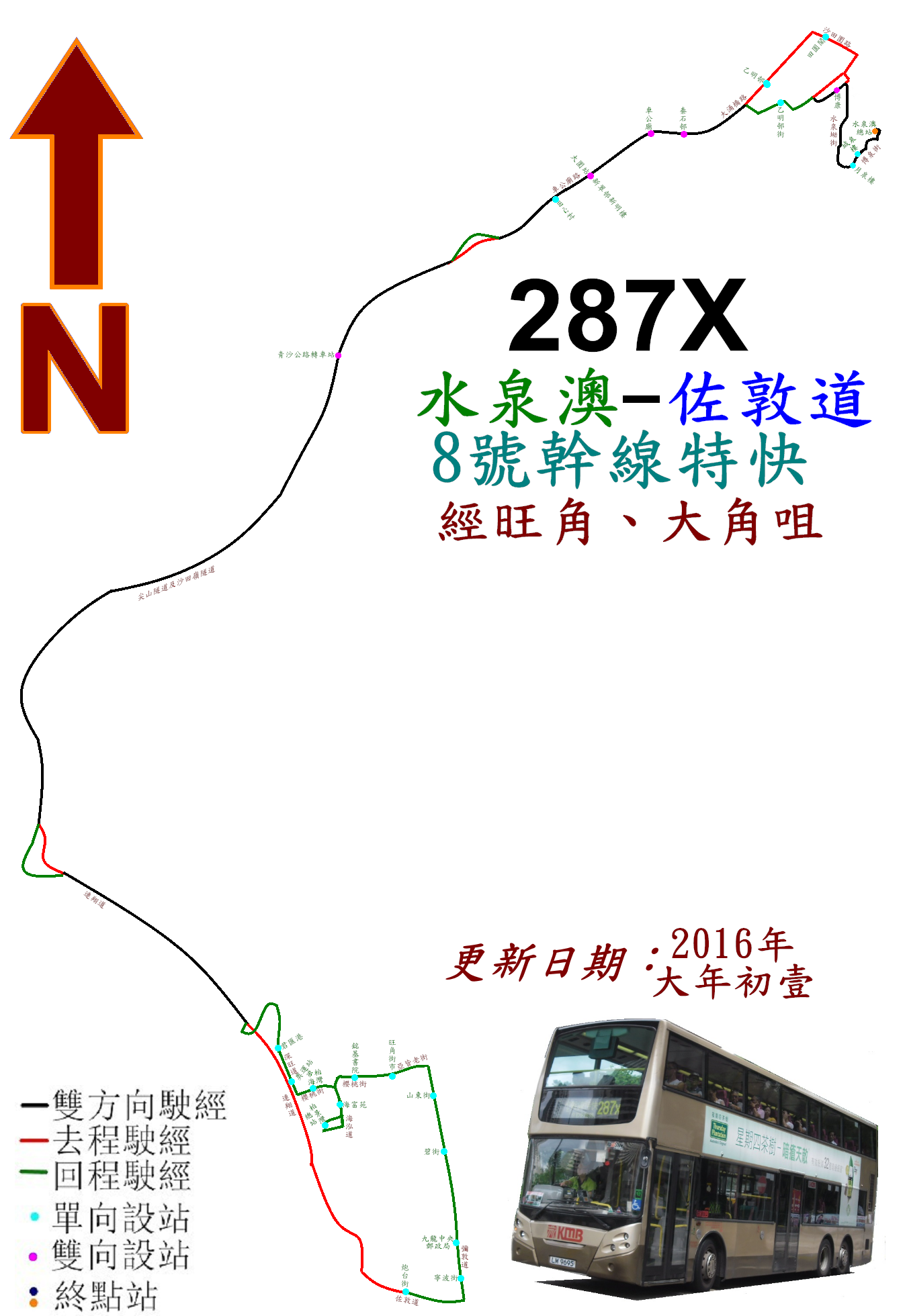 中文（香港）: 九巴287X線的走線圖